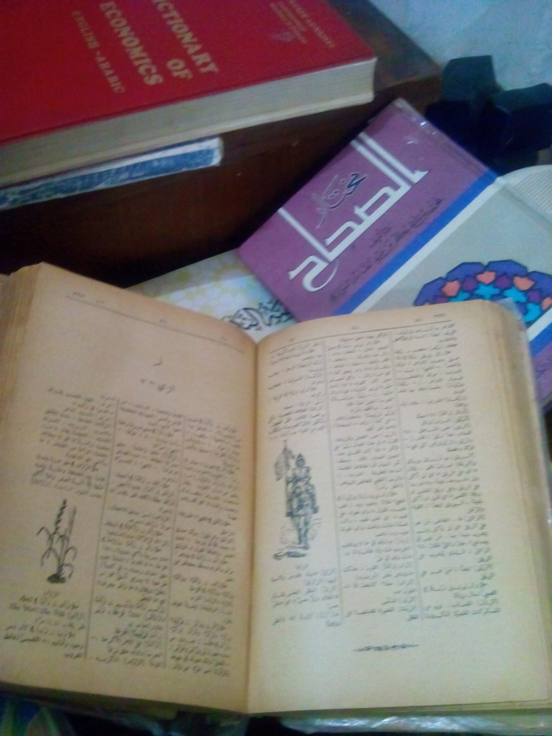 المنجد قاموس قديم باللغة العربية في طبعته السابعة نيسان 1931